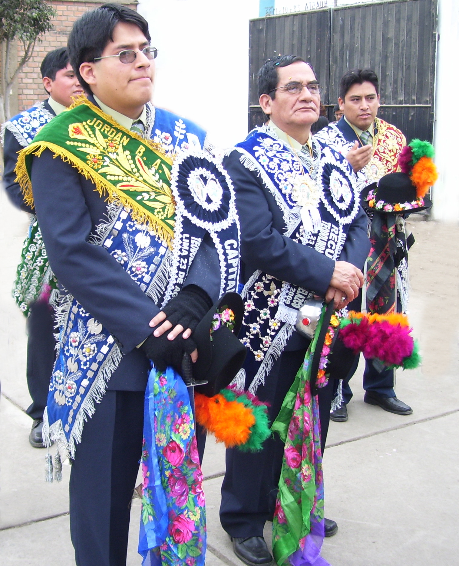 Capitán y sus acompañantes de Fiesta Patronal de Acas.